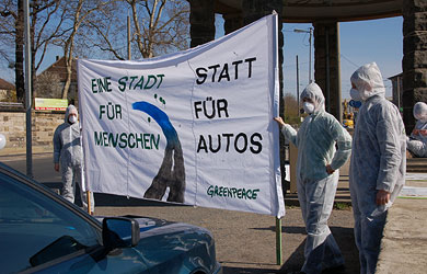 Aktion des Greenteam Schwarze Eiche und der Greenpeacegruppe Dresden gegen die Waldschlösschenbrücke und die damit verbundene Co2-Emission